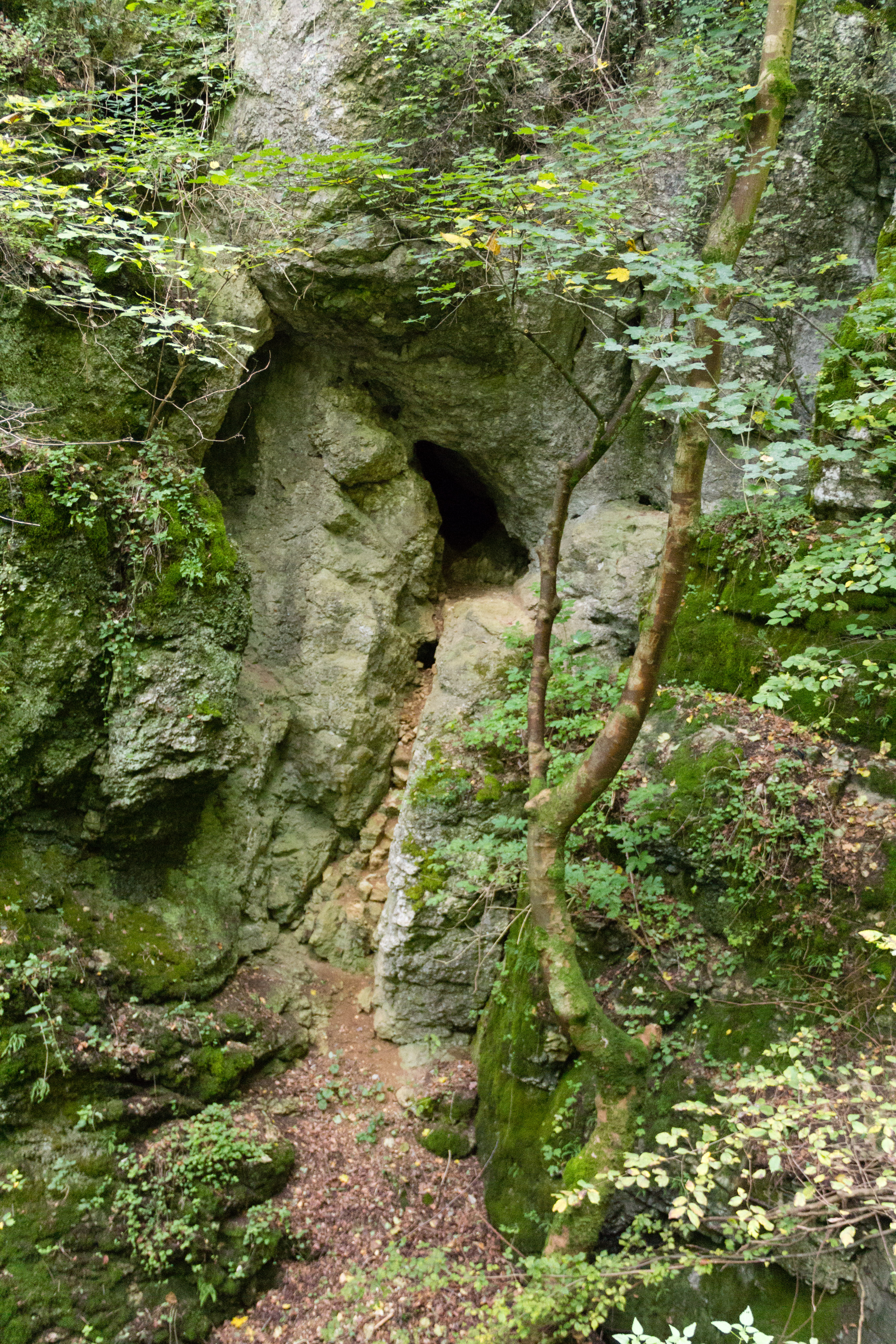 Streitberg, Schwammkalkfelswand mit Höhlen NW von Streitberg, Geotop, Naturdenkmal